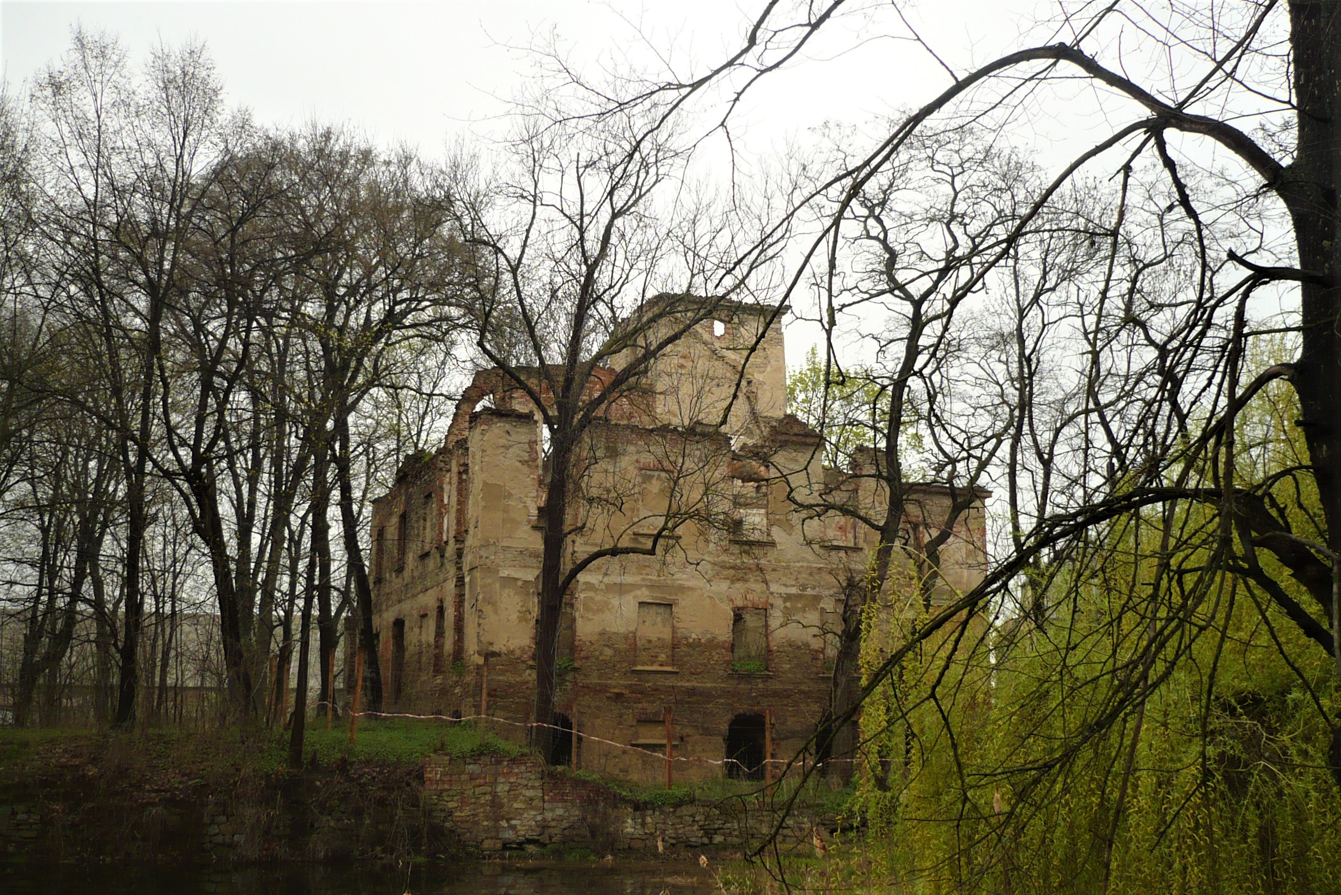 Pałac w Sulisławicach